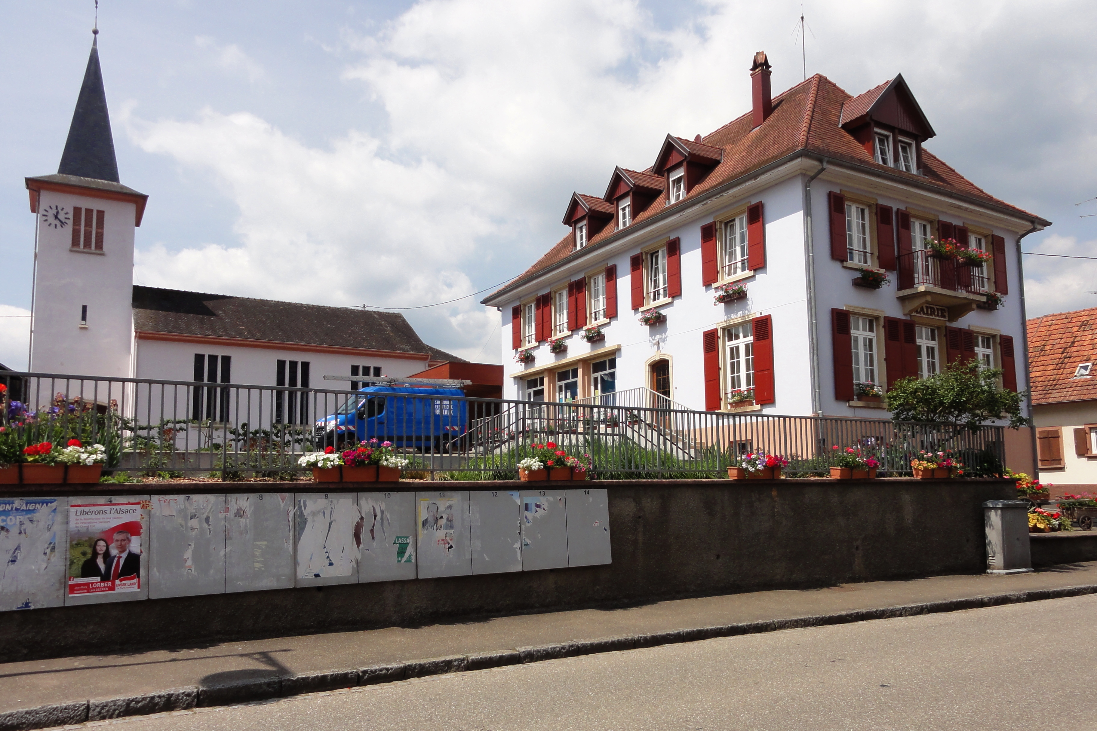 Alsace, Bas-Rhin, Bischholtz, Mairie-école et Église protestante (1957), 1 rue Principale. .